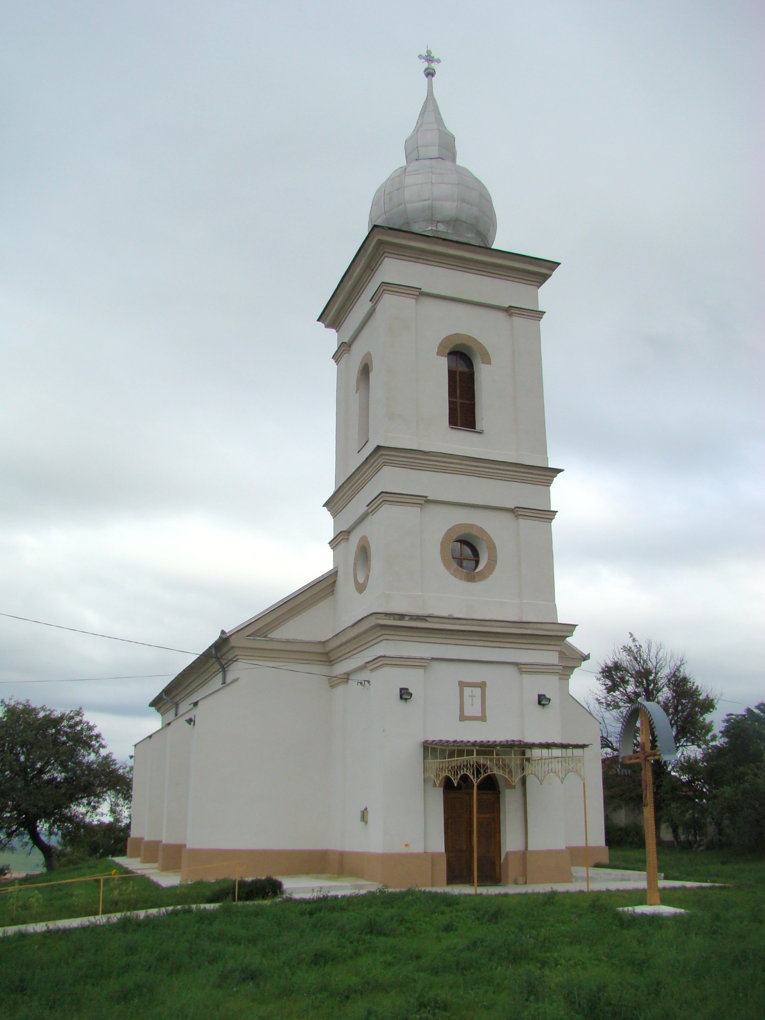 Biserica ortodoxă din satul Ceanu Mic, comuna Tureni, județul Cluj